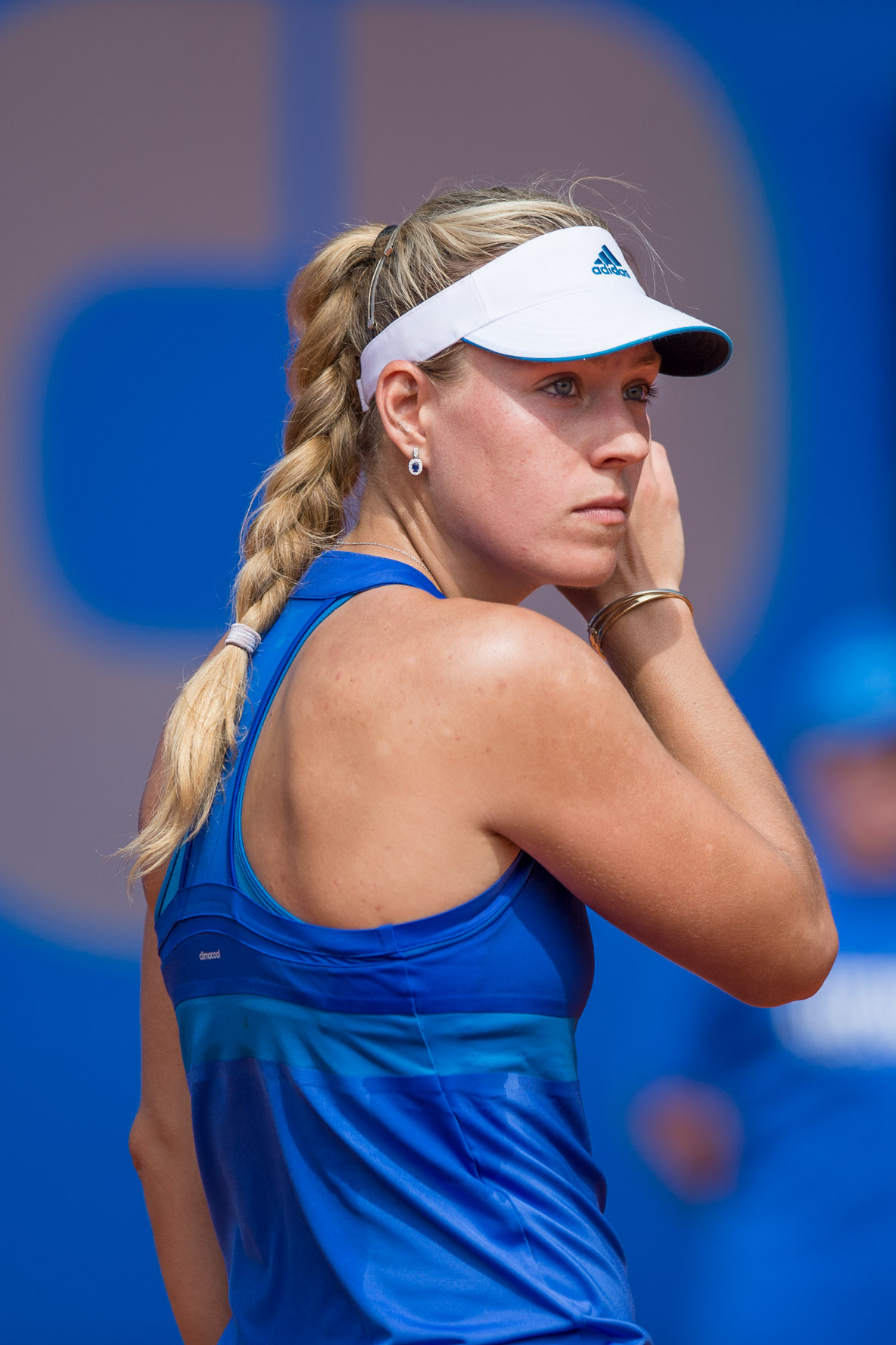 Angelique Kerber,Damentennis,Nürnberger Versicherungscup 2014,Tennis,WTA